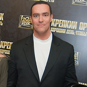 Александр Невский на фоне афиши фильма «Крепкий орешек: Хороший день, чтобы умереть» в 2013 году